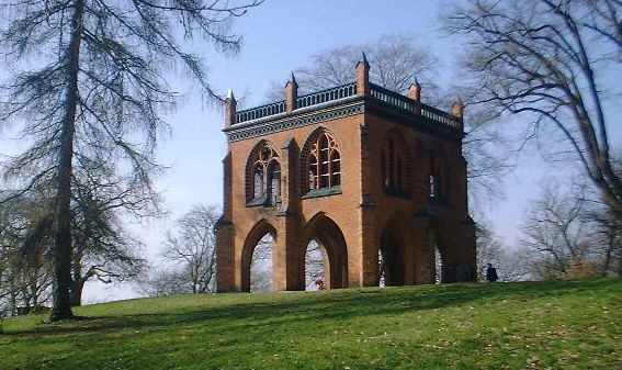 Die ehemalige Berliner Gerichtslaube im Park Babelsberg, Foto: Acf 2003; Public Domain